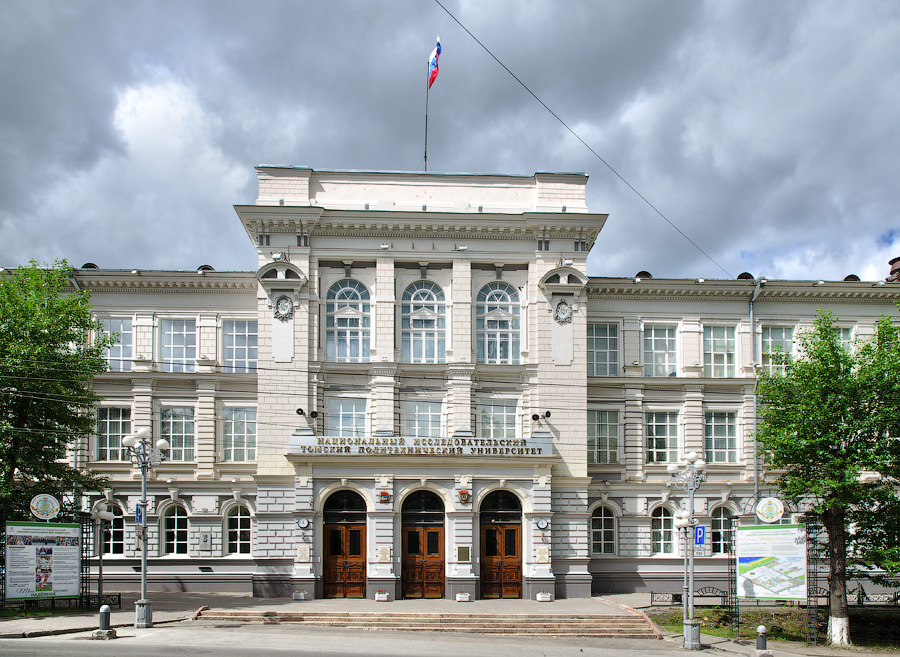 Главный корпус Технологического института (Томский политехнический университет), где в 1904—1905 гг. на вечерних общеобразовательных курсах учился С. М. Киров (Томская область, Томск, Ленина проспект, 30)